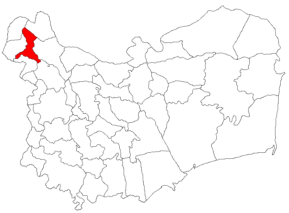 Categorie:Hărţi ale judeţului Tulcea